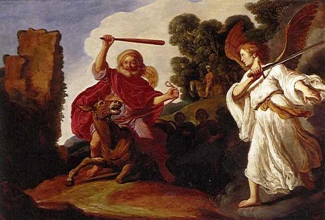 Balaam i oslica